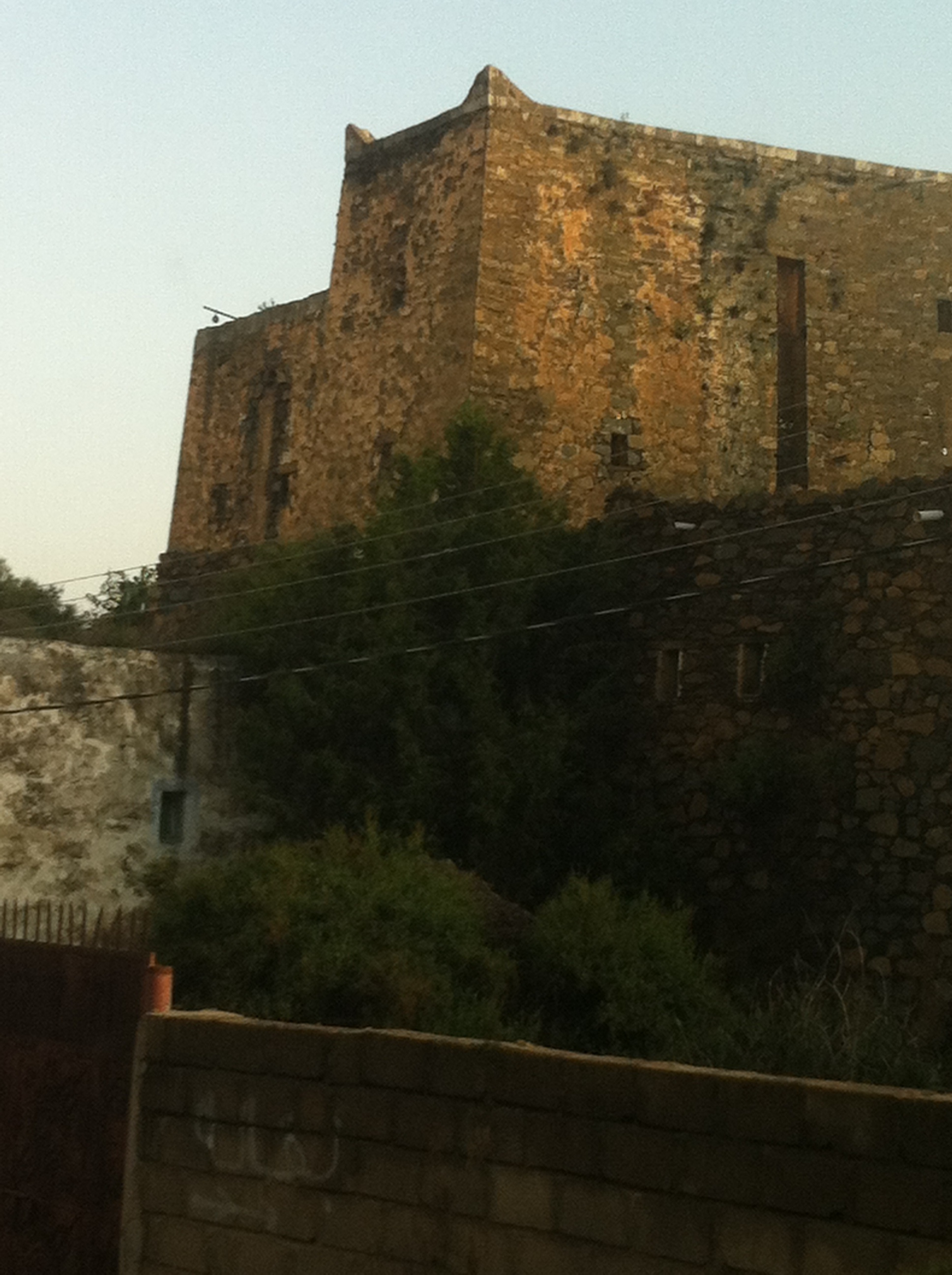 احد القصور القديمه في قرية السقاء بمنطقة عسير